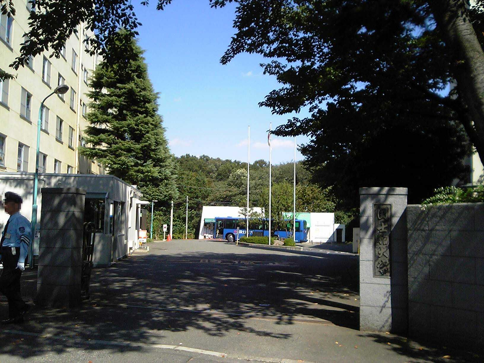 国士舘大学（2005年10月1日投稿者が撮影）